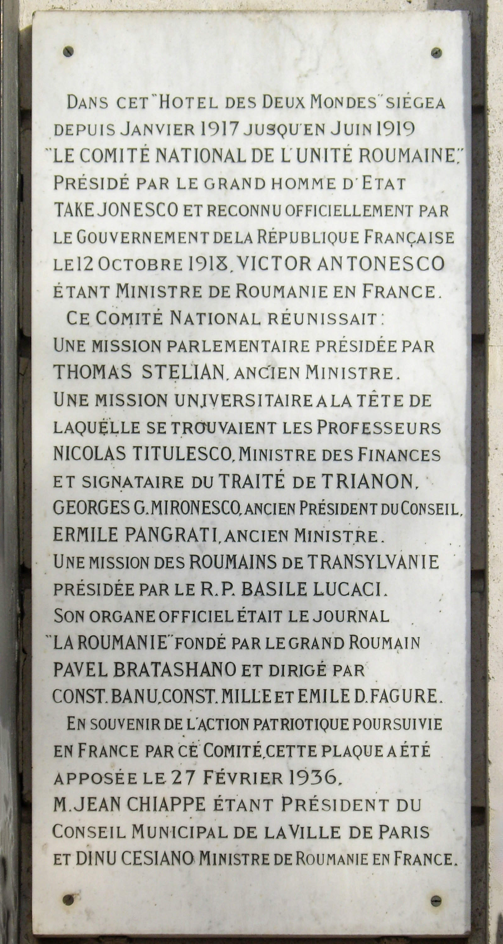 Plaque commémorative, 22 avenue de l'Opéra, Paris 1er.« Dans cet hôtel des Deux Mondes siégea depuis janvier 1917 jusqu'en juin 1919 le Comité national de l'unité roumaine, présidé par le grand homme d'État Take Jonesco [Take Ionuscu] et reconnu officiellement par le gouvernement de la République française le 12 octobre 1918, Victor Antonesco étant ministre de Roumanie en France.Ce comité national réunissait une mission parlementaire présidée par Thomas Stelian, ancien ministre ; une mission universitaire à la tête de laquelle se trouvaient les professeurs Nicolas Titulesco [Nicolae Titulescu], ministre des Finances et signataire du traité de Trianon, Georges G. Mironesco [Gheorghe Mironescu], ancien président du Conseil, Ermile Pangrati [Emil Pangrati], ancien ministre ; une mission des Roumains de Transylvanie présidée par le R. P. Basile Lucaci [Vasile Lucaci]. Son organe officiel était le journal La Roumanie, fondé par le grand Roumain Pavel Bratashano [Pavel Brătăşanu] et dirigé par Const. Banu [Constantin Banu], Const. Mille [Constantin Mille] et Emile D. Fagure.En souvenir de l'action patriotique poursuivie en France par ce comité, cette plaque a été apposée le 27 février 1936, M. Jean Chiappe étant président du conseil municipal de la Ville de Paris et Dinu Cesiano ministre de Roumanie en France. »